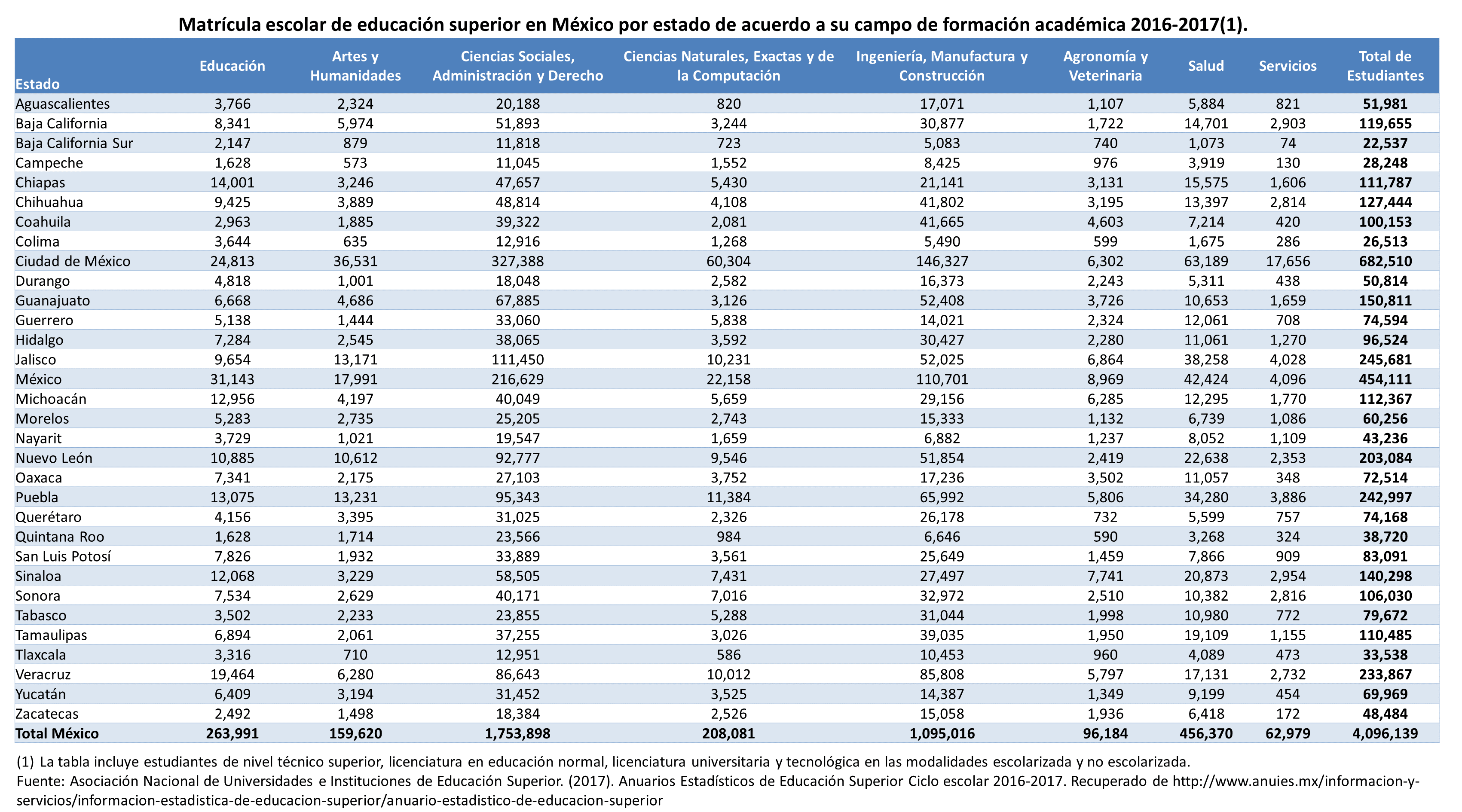 Matrícula escolar de educación superior en México por estado de acuerdo a su campo de formación académica 2016-2017.